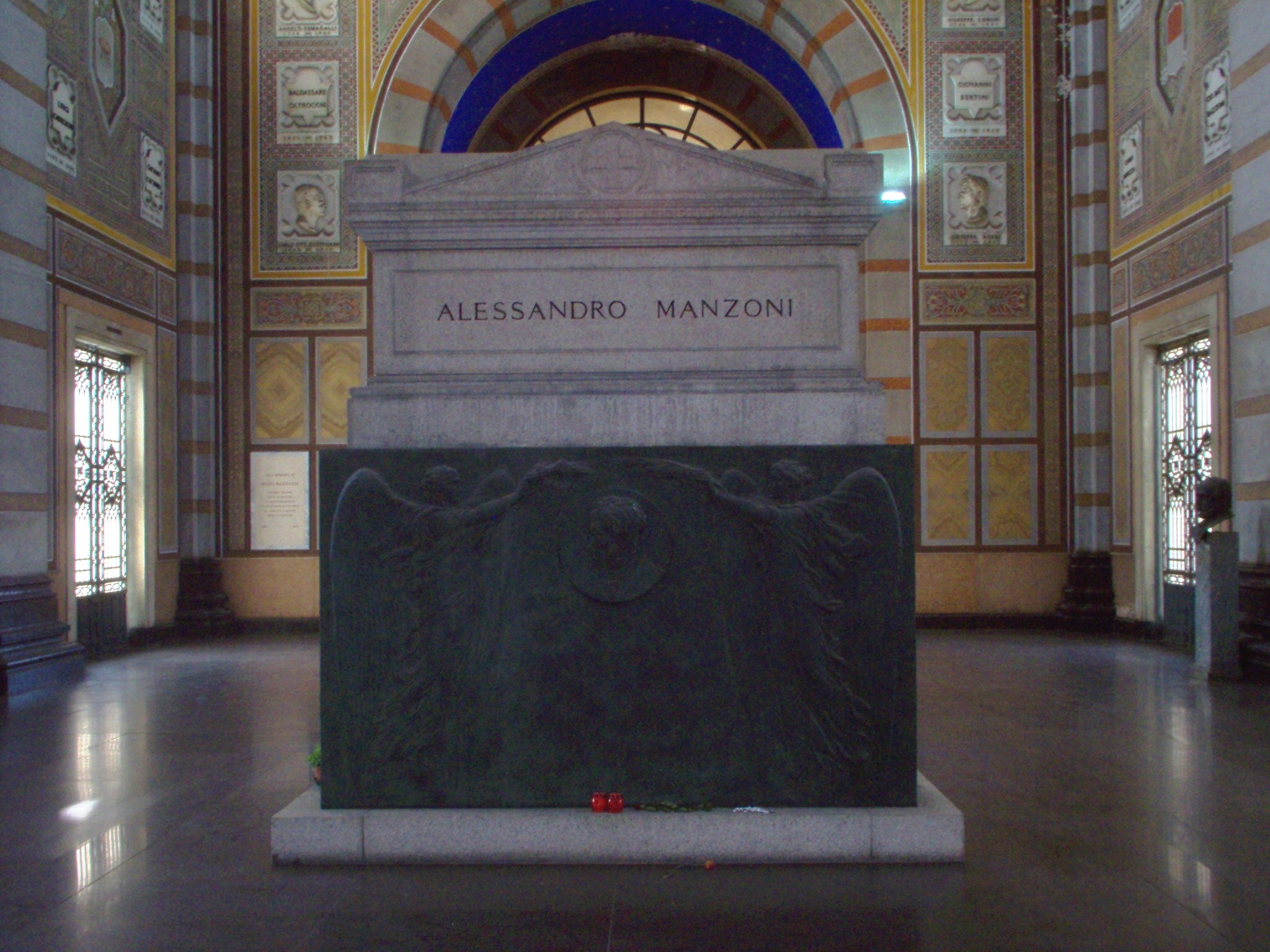 Tombeau d'Alessandro Manzoni au cimetière monumental de Milan.